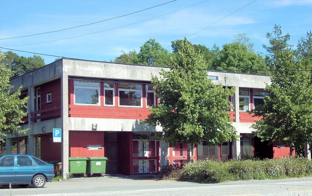 Eydehavn Helsehus på Eydehavn, Arendal kommune, Aust-Agder, Norge